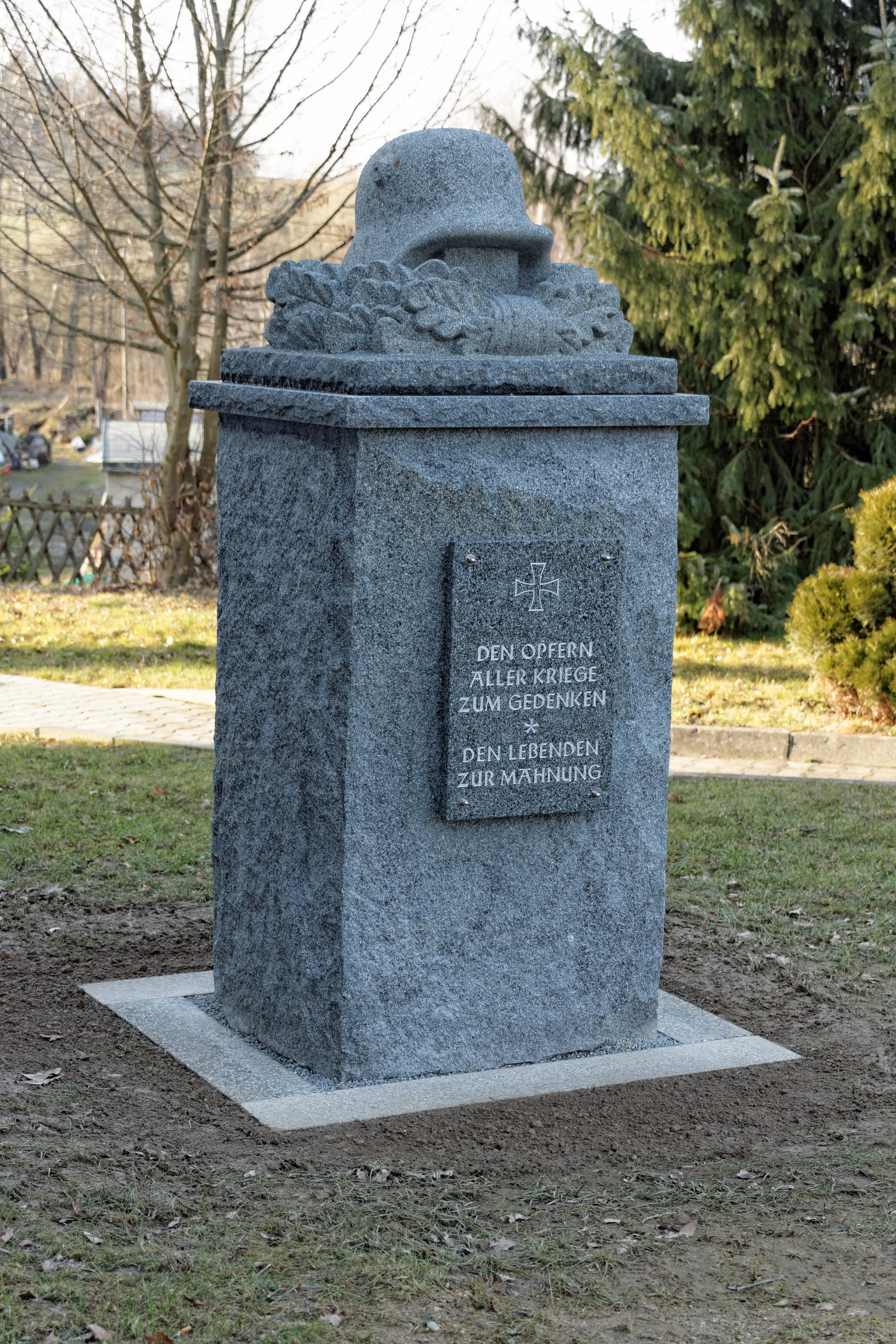 Neu gestalteter Gedenkstein am Schützenheim in der Rumburger Straße.